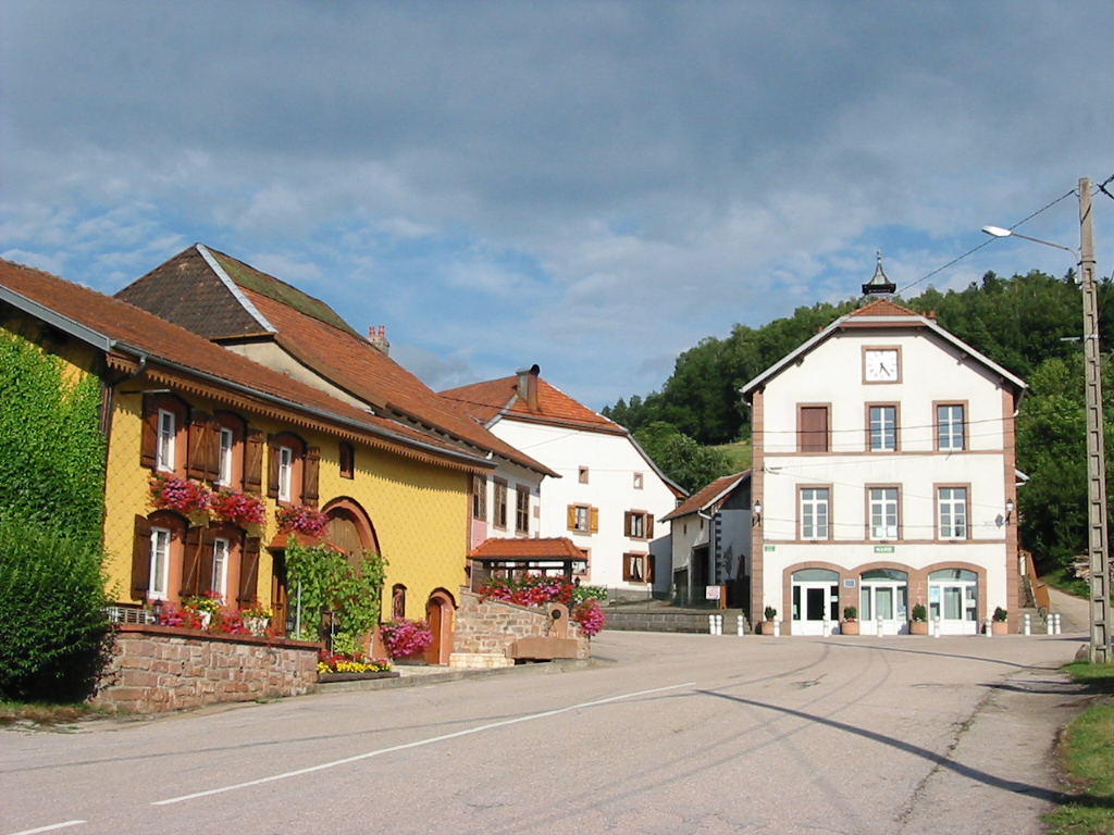 Gemaingoutte La mairie Commune des Vosges Canton de Saint-Dié-des-Vosges-Est Photo personnelle du 3 août 2006. Copyright © Christian Amet